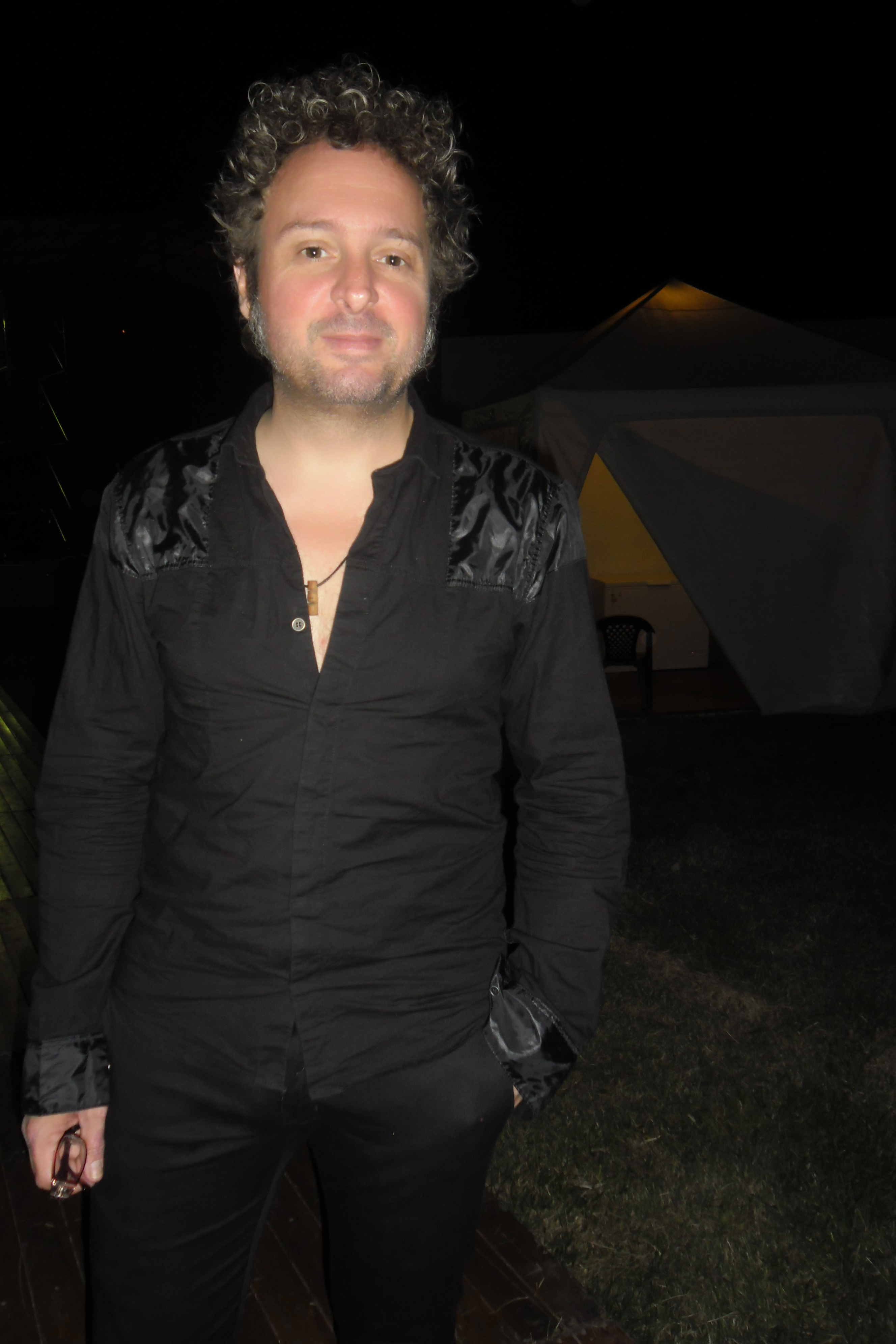 Walter Piancioli, vocalista de Los Tipitos en Mendoza (2015).